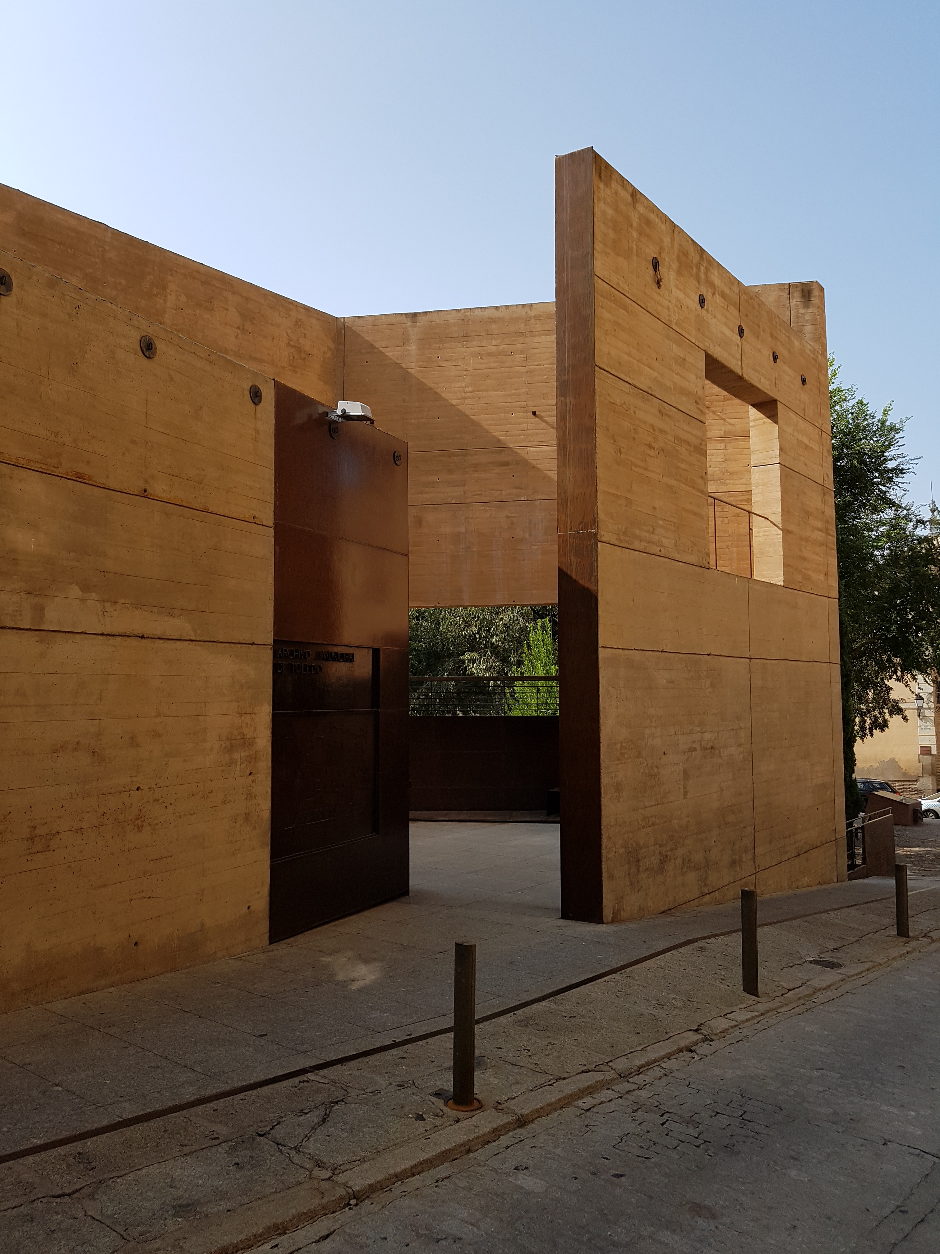 Exterior del Archivo Municiapal de Toledo